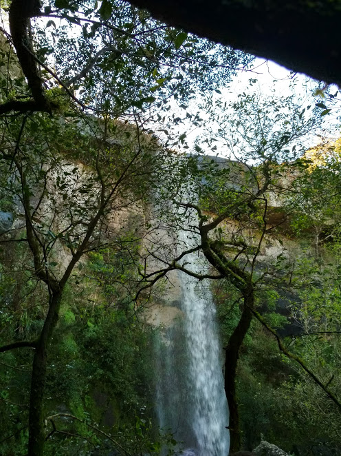 Cascada Chorro de Agua Fría, Tacuarembó, Uruguay